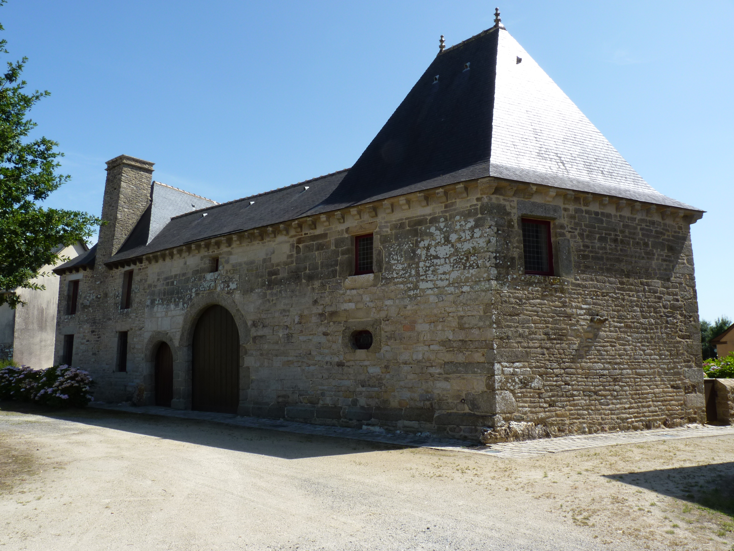 Manoir daté de 1644 et remanié par la suite.